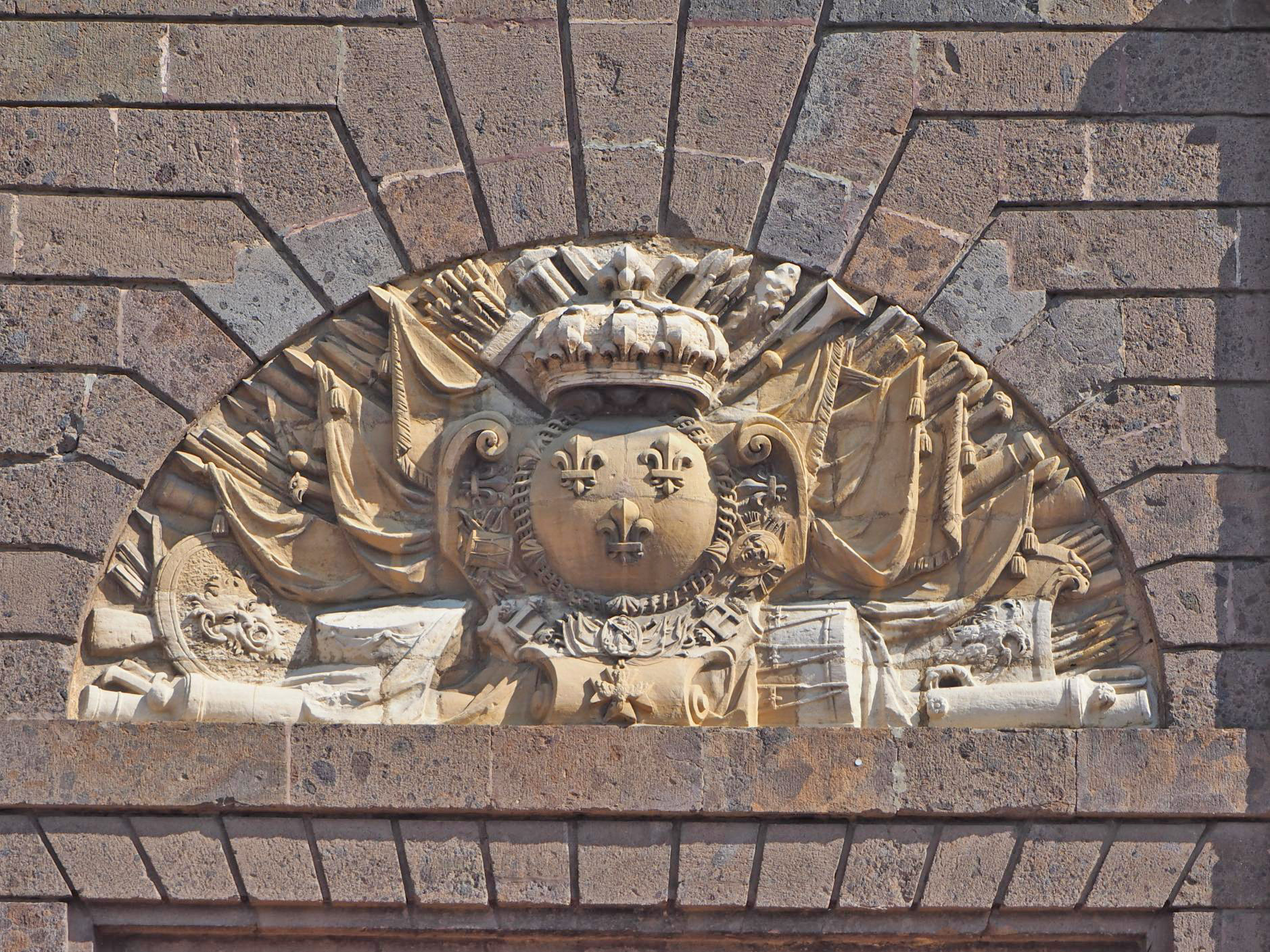 Breisach am Rhein, Rheintor, Detail, September 2017